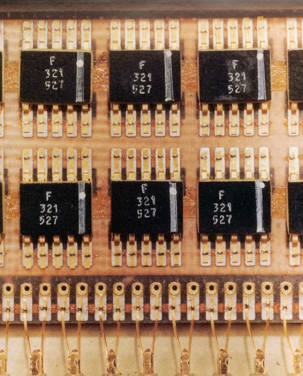 AGC Flatpack (Block II) Quelle: NASA (pd)